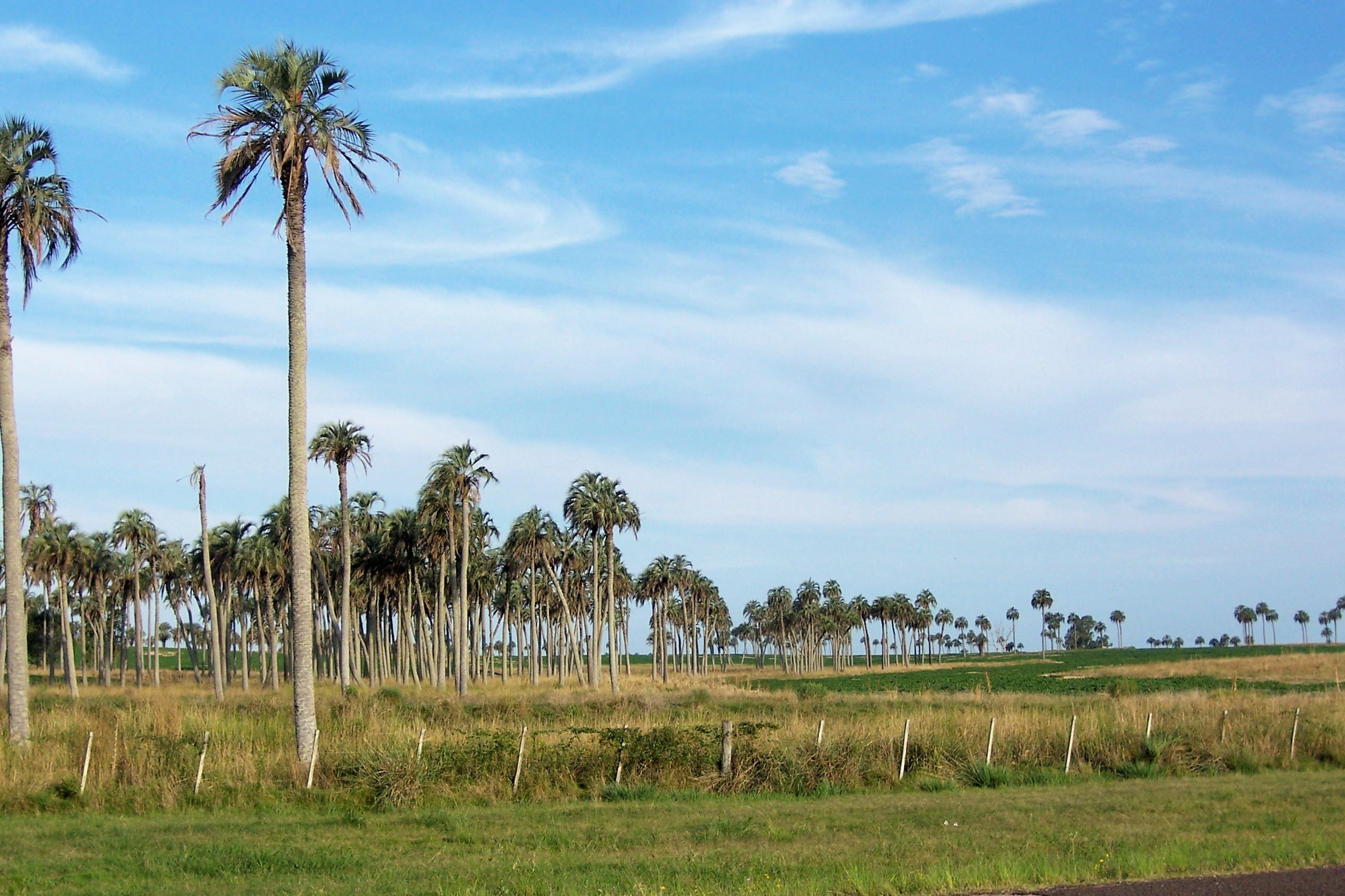 palmares del noroeste de Uruguay, departamento de Paysandú. Este tipo de palmar se desarrolla de forma irregular en grupos aislados, encontrándose en suelos arenosos y profundos. Ocupa un área aproximada de 2500 ha, y se continúa hacia la provincia de Entre Ríos (Argentina), donde su extensión es mucho mayor. La especie que conforma esta comunidad es la palma Yatay (Butia yatay).